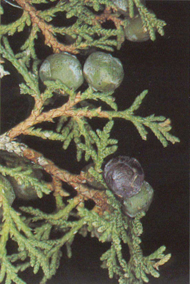 frutos y hojas del Juniperus thurifera (Sabina)